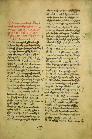 Страница "Истории Армении" Киракоса Гандзакеци